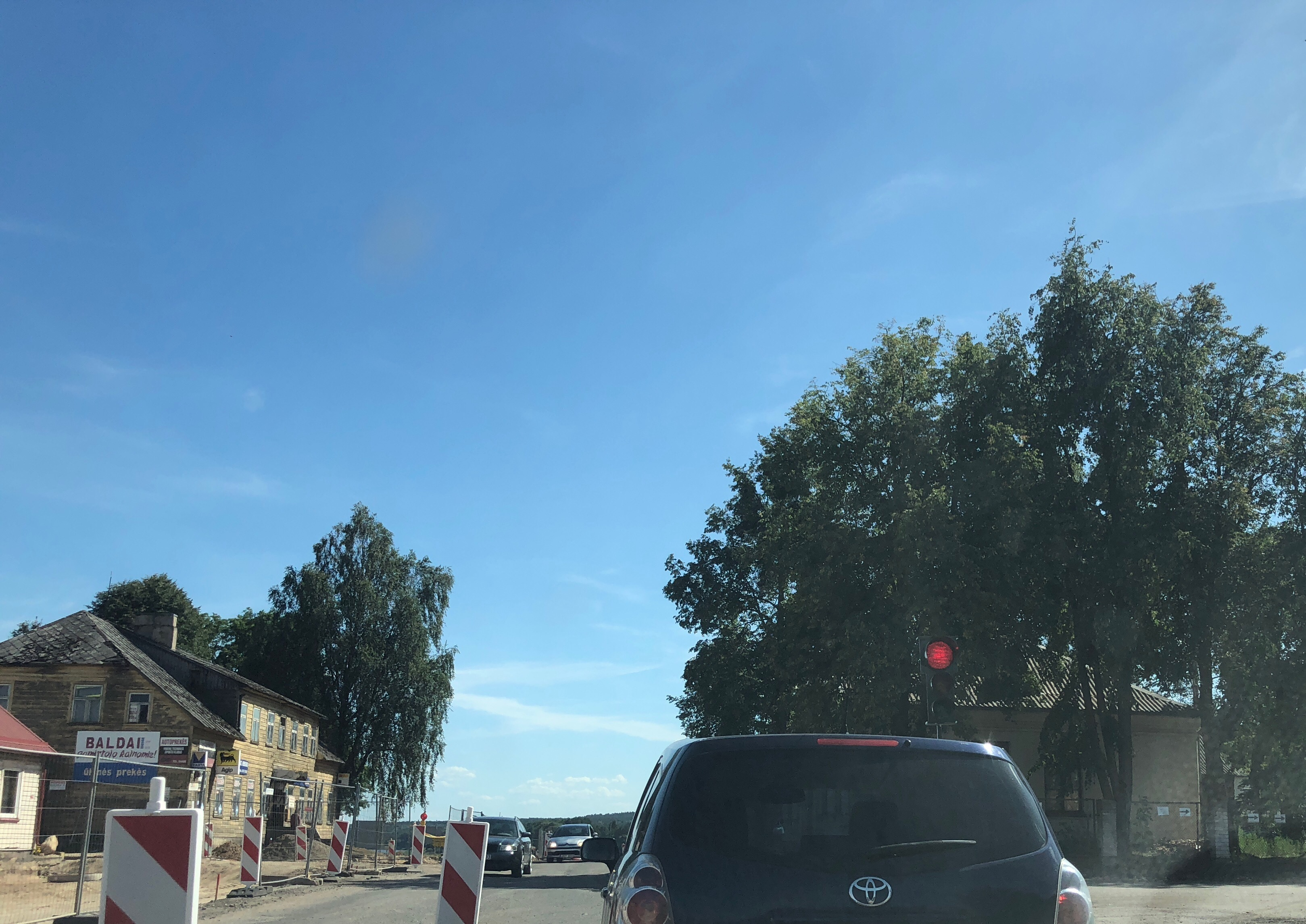 Пренай